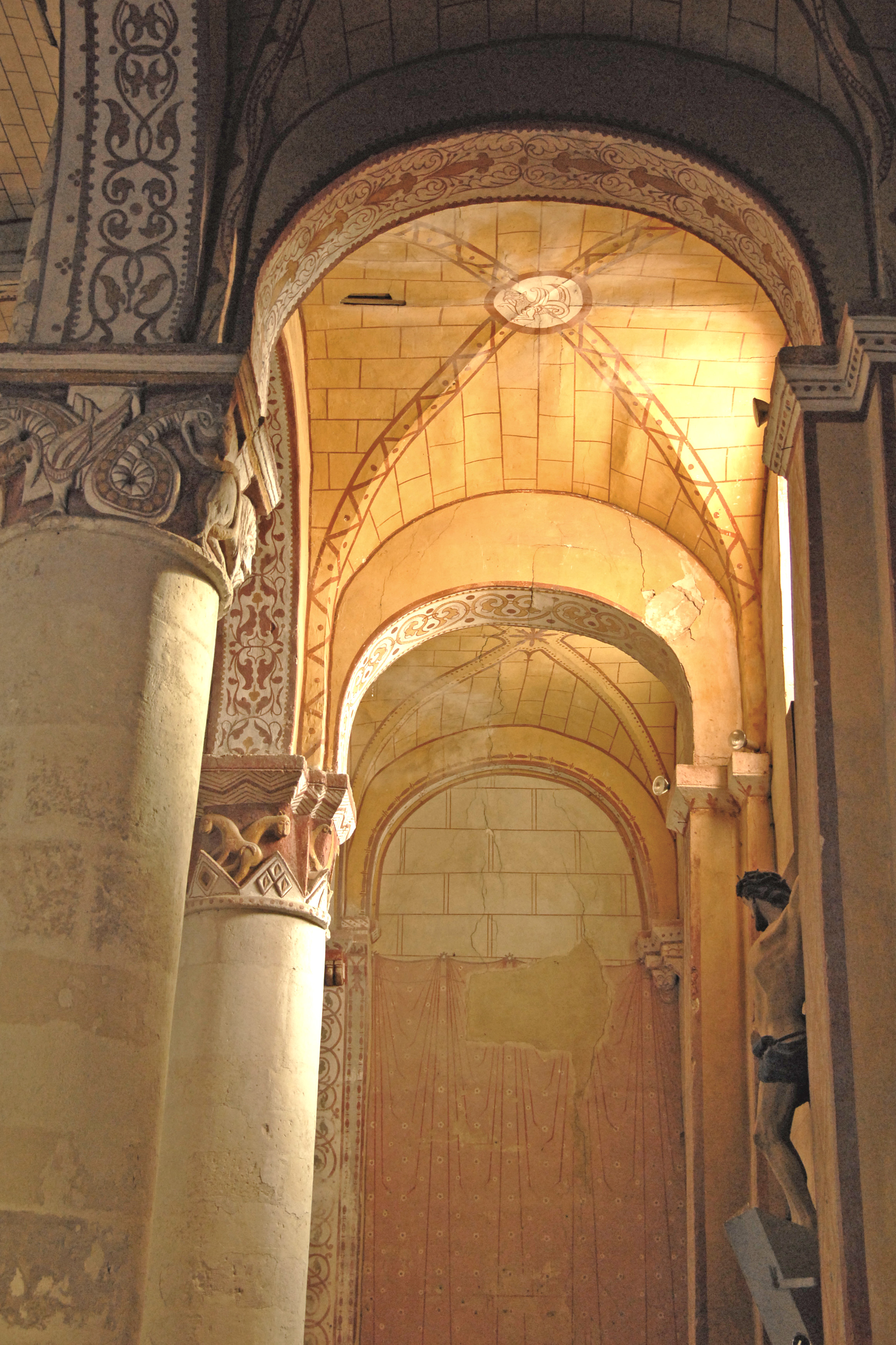 Civaux, Kirche, Seitenschiff rechts